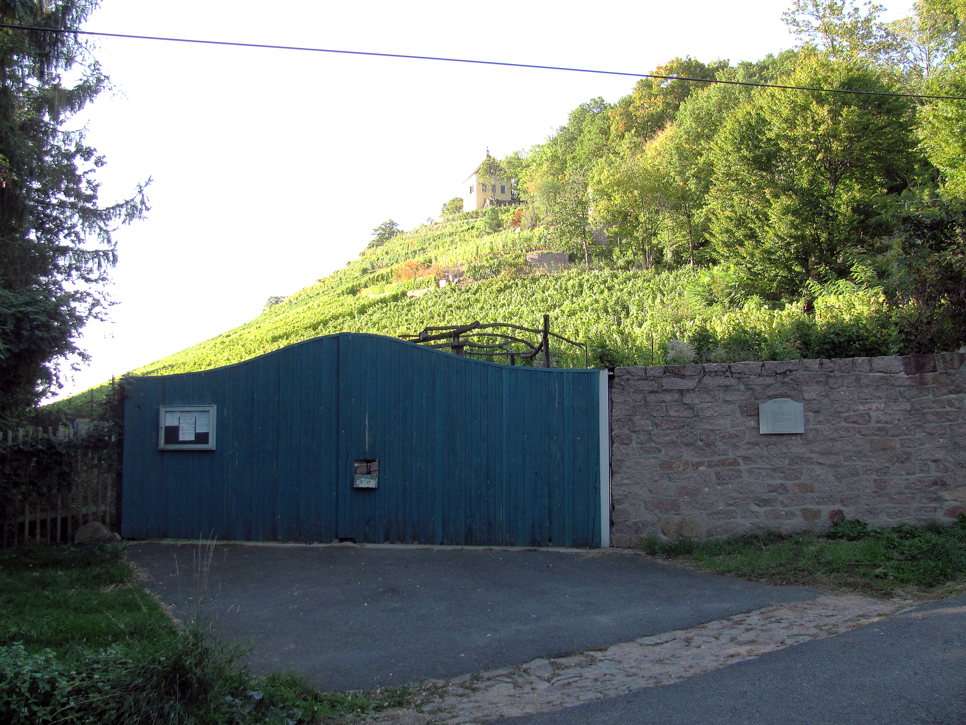 Radebeul, Minckwitzscher Weinberg, als Werk der Landschafts- und Gartengestaltung geschützte Steillage mit Weinbergshaus